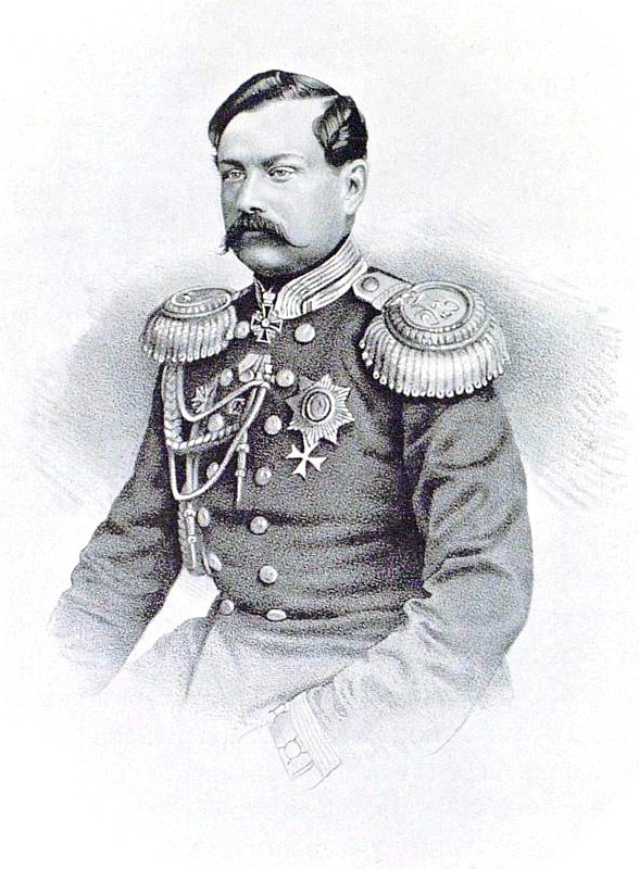 Граф Александр Иванович Бреверн де Лагарди, командир Кавалергардского полка